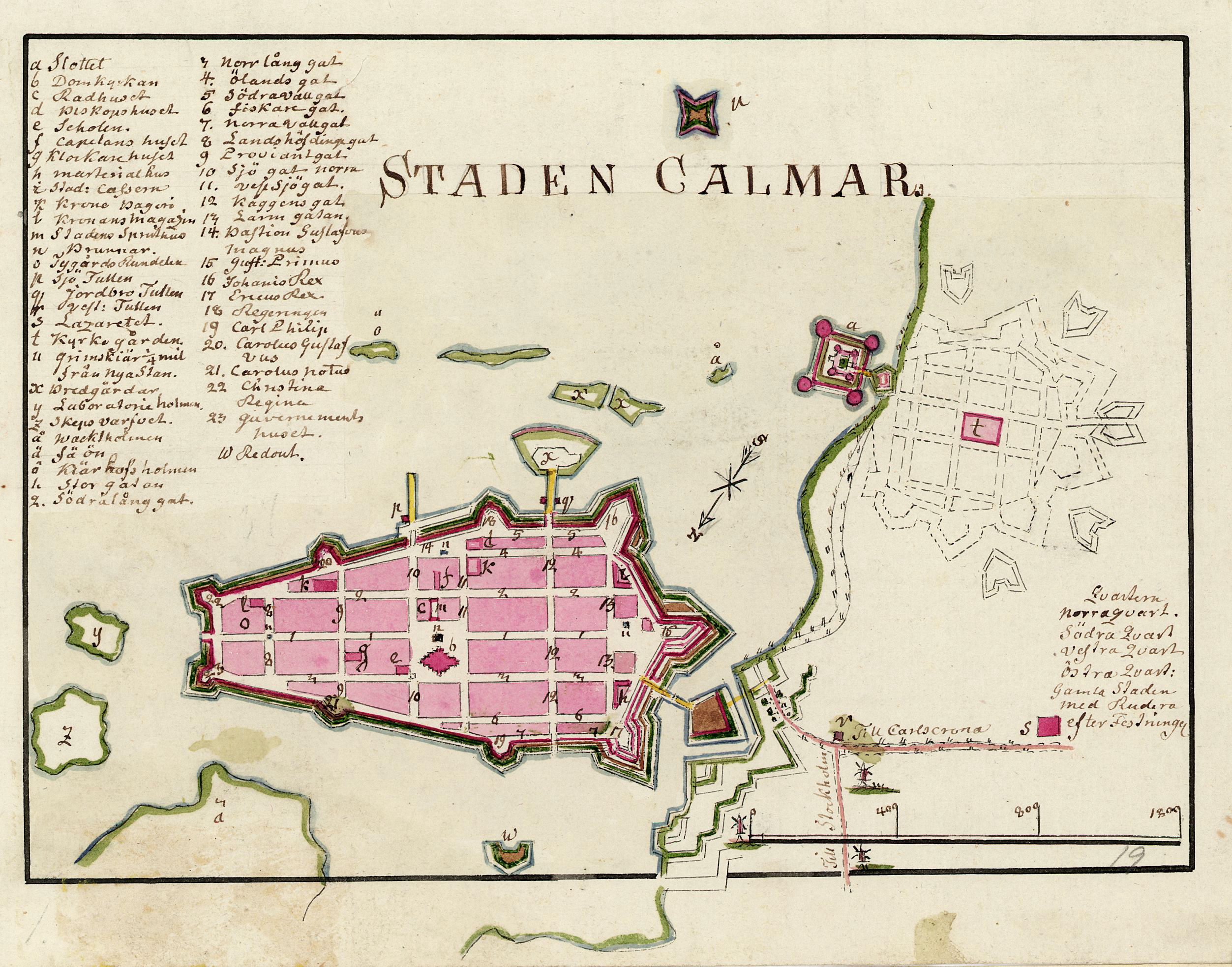 Karta över Kalmar från ca: år 1800 av Fredrik Adolf Wiblingen.